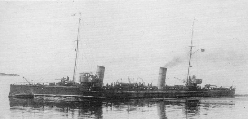 Эскадренный миноносец Боевой